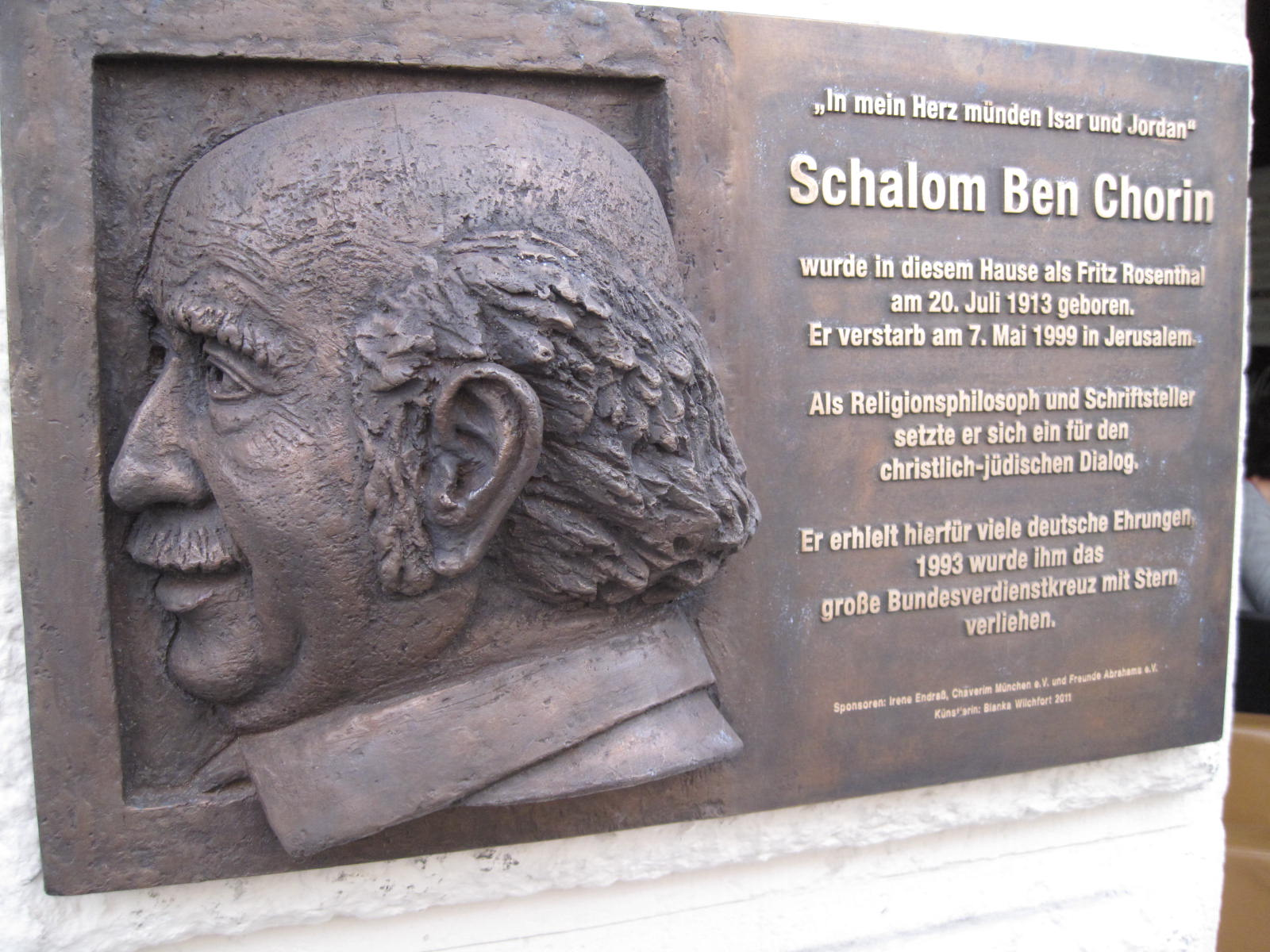 Gedenktafel Geburtshaus Schalom Ben Chorin, München, Zweibrückenstraße 8 (Künstlerin: Blanka Wilchfort, 2011)